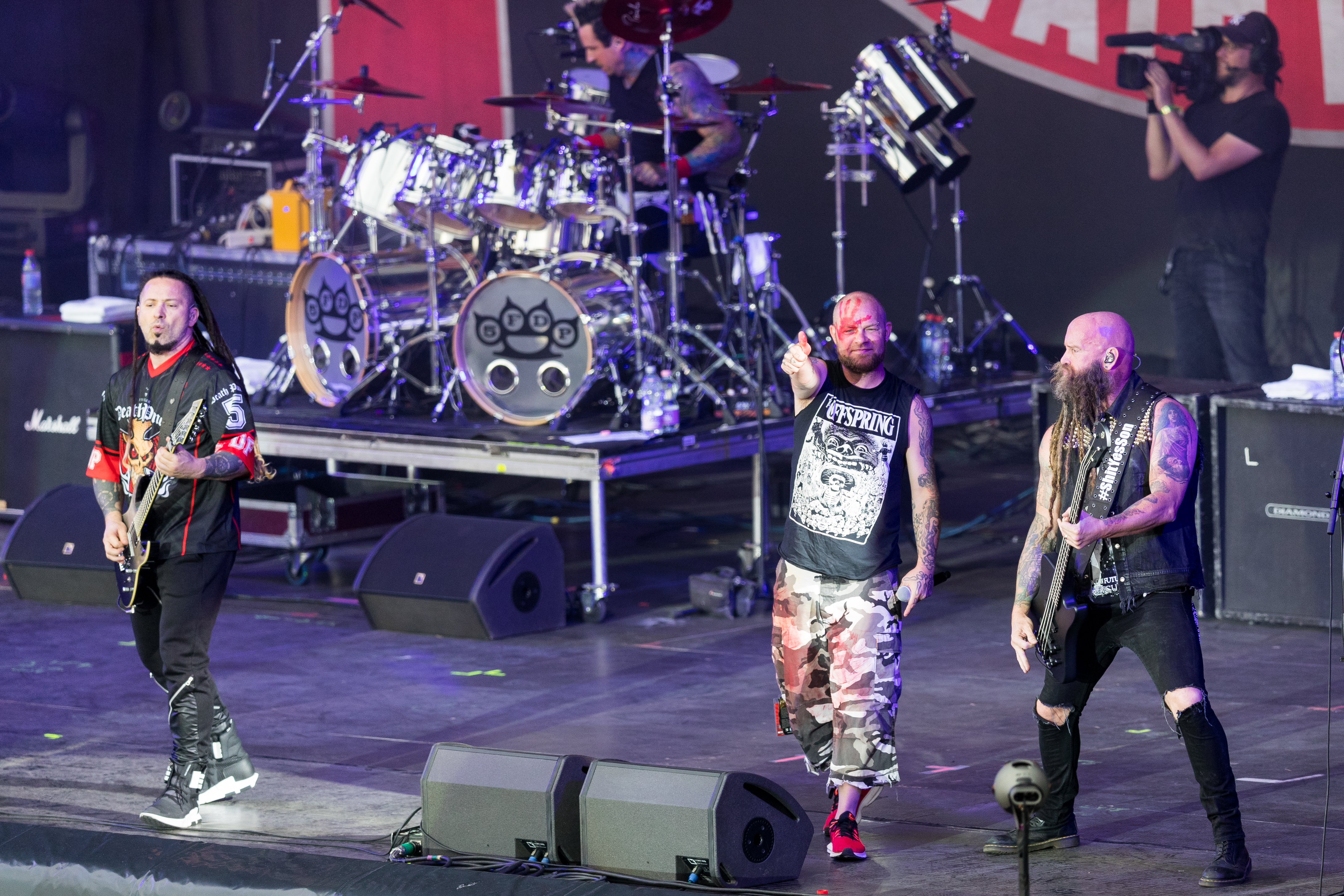 Five Finger Death Punch during Rock am Ring at Nürburgring, Nürnburg, Rheinland Pfalz, Germany on 2017-06-02, Photo: Sven Mandel